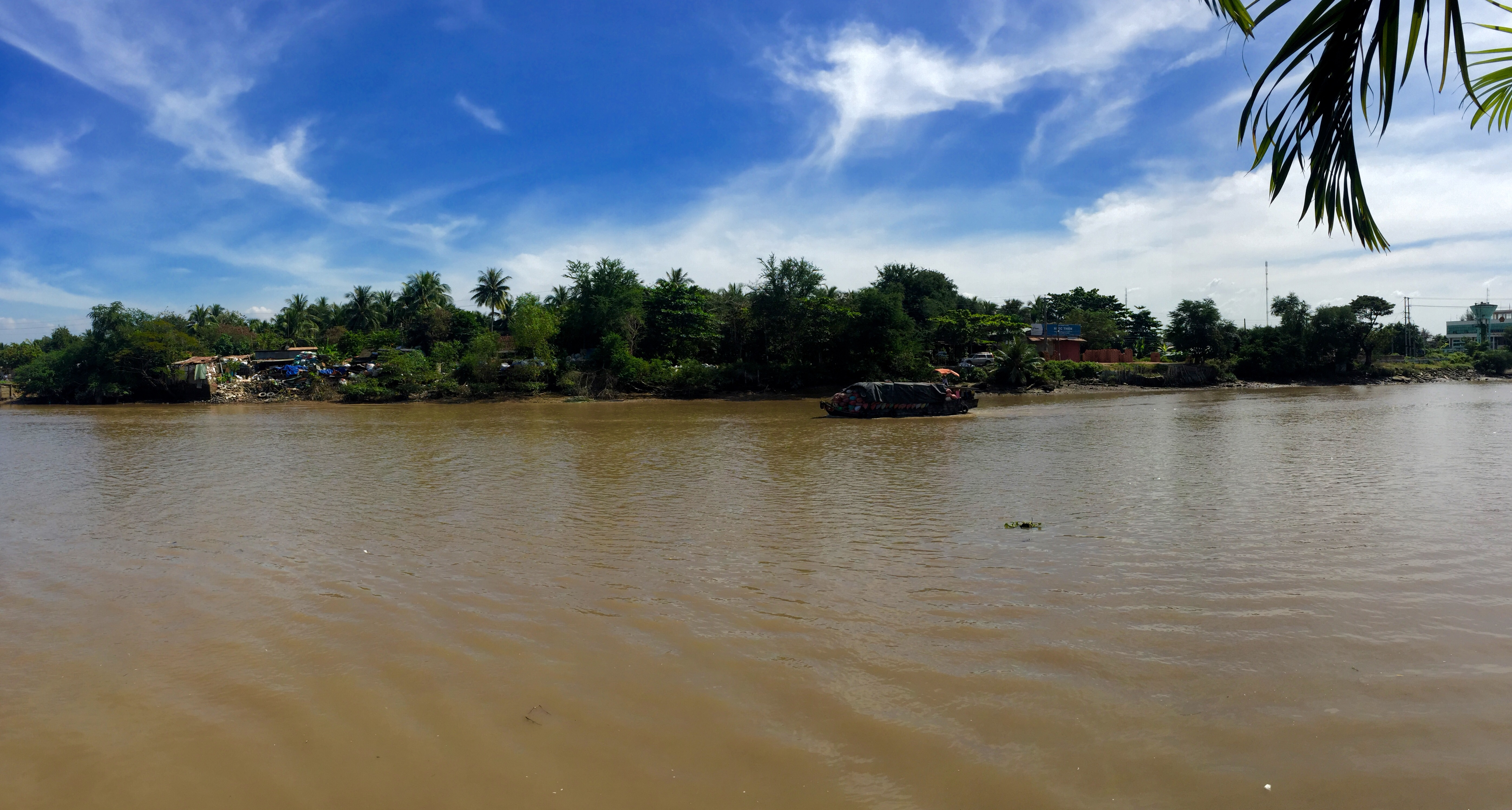 tt. Chợ Gạo, Chợ Gạo, Tiền Giang, Vietnam